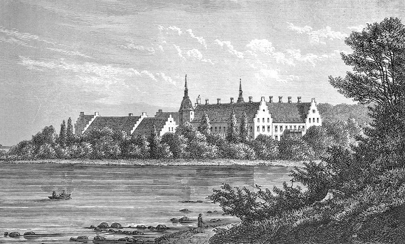 Holsteinborg er en gammel sædegård fra 1357, som under navnet Braade var en hovedgård under Roskilde bispestol.